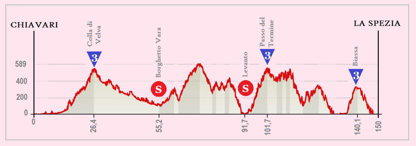 Perfil de la 4.ª etapa del Giro de Italia 2015